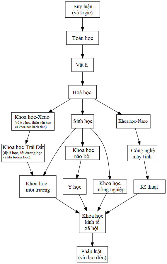 This is a diagram for the partial ordering of the sciences as proposed by Alexadru T. Balaban and Douglas J. Klein in their article entiled "Is chemistry ‘The Central Science’? How are different sciences related? Co-citations, reductionism, emergence, and posets", Scientometrics 2006, 69, 615-637. Redrawn with Graphviz and exported to SVG by User:Keenan Pepper. I translated this image into Vietnamese on September 2, 2017